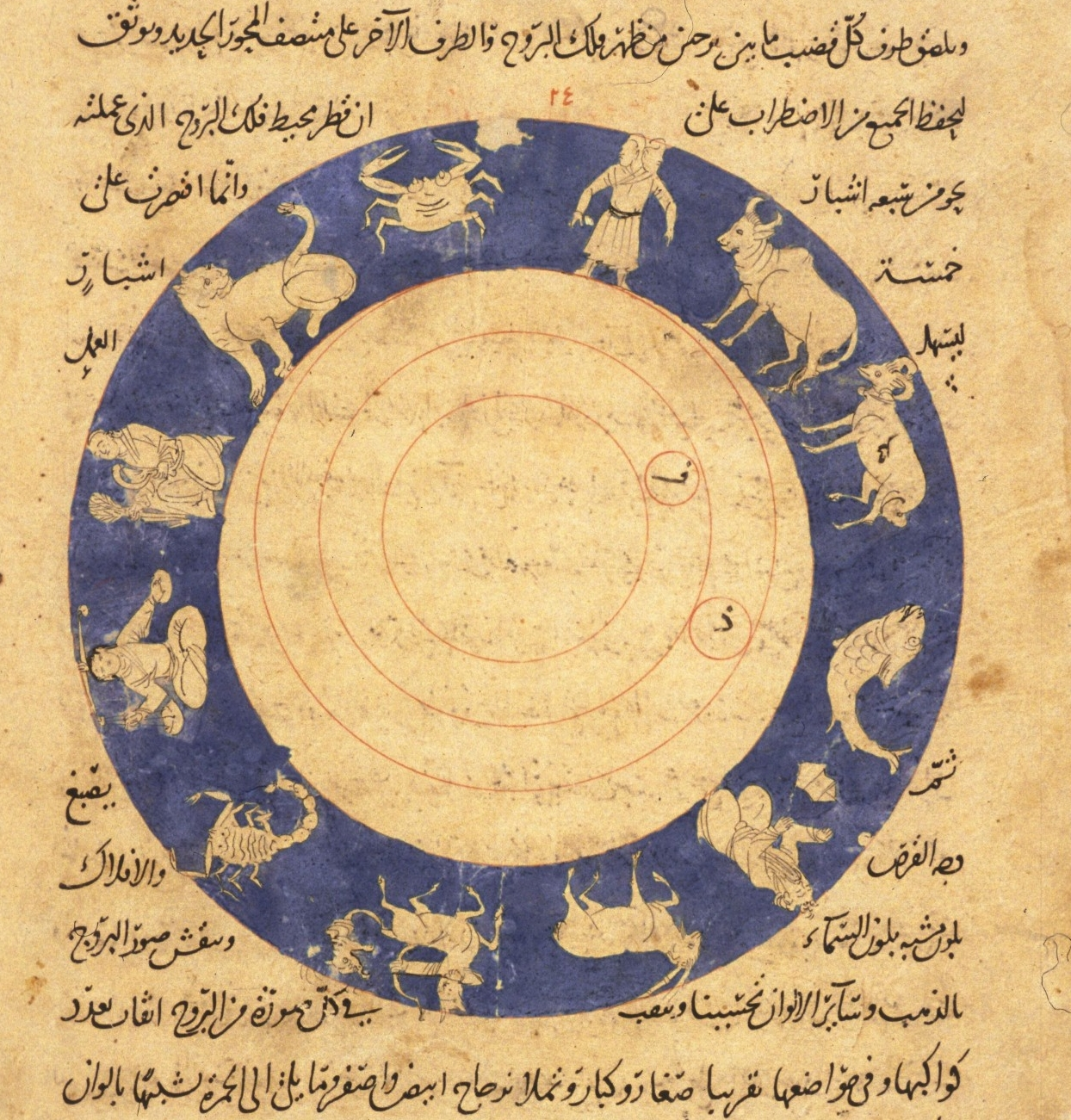 Arabic Machine Manuscript (Orient manuscript 3306)